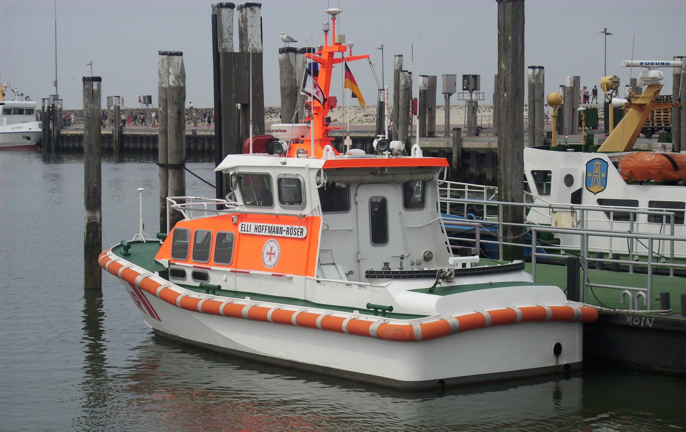 Seenotrettungsboot Elli Hoffmann-Röser im Hafen von Baltrum